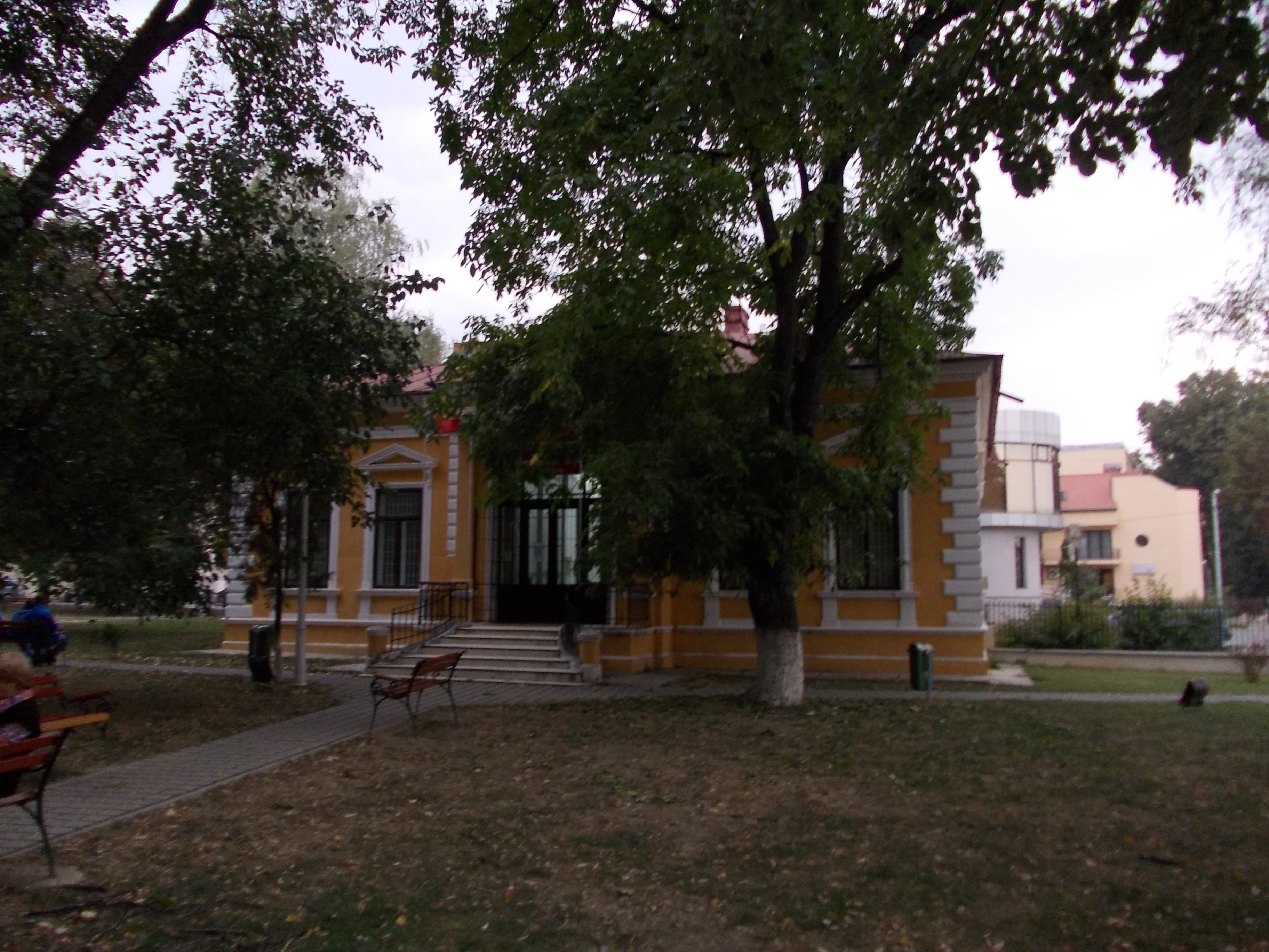 Casa Robu, azi Muzeul de Artă